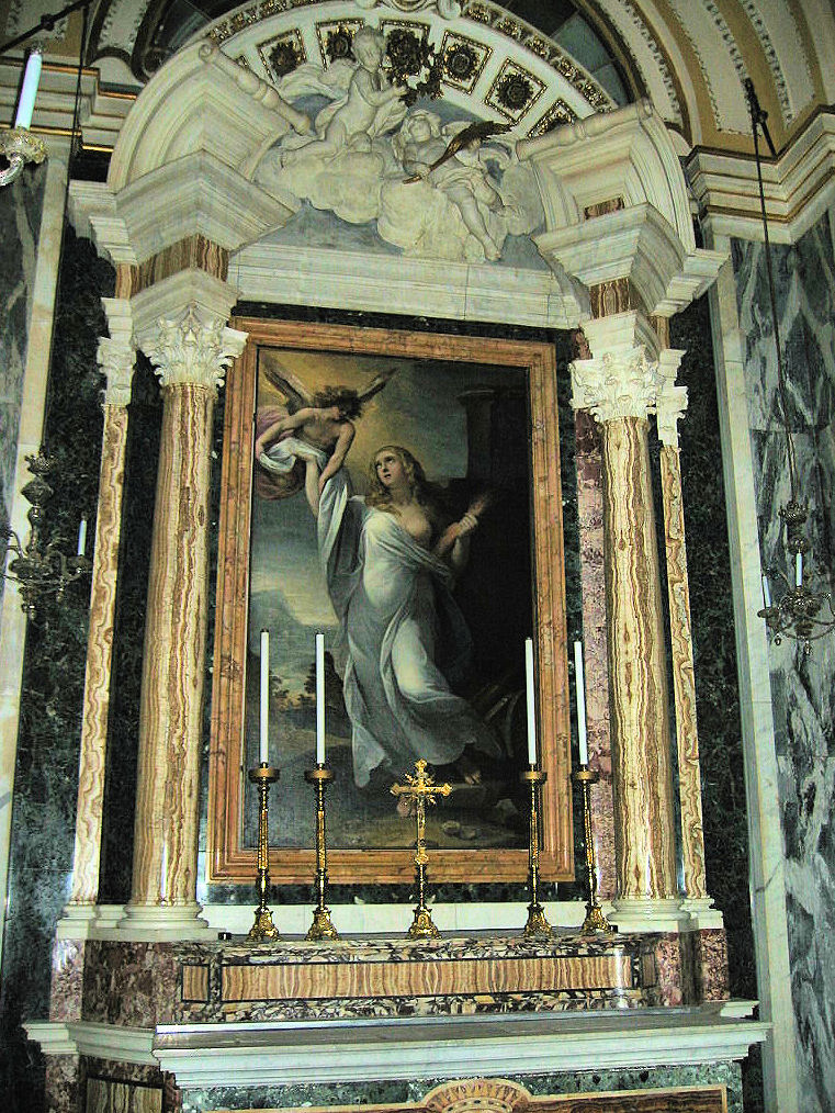 "Santa Barbara", Cappella di Santa Barbara, Santa Maria in Traspontina, Roma Cavalier d'Arpino (1597)